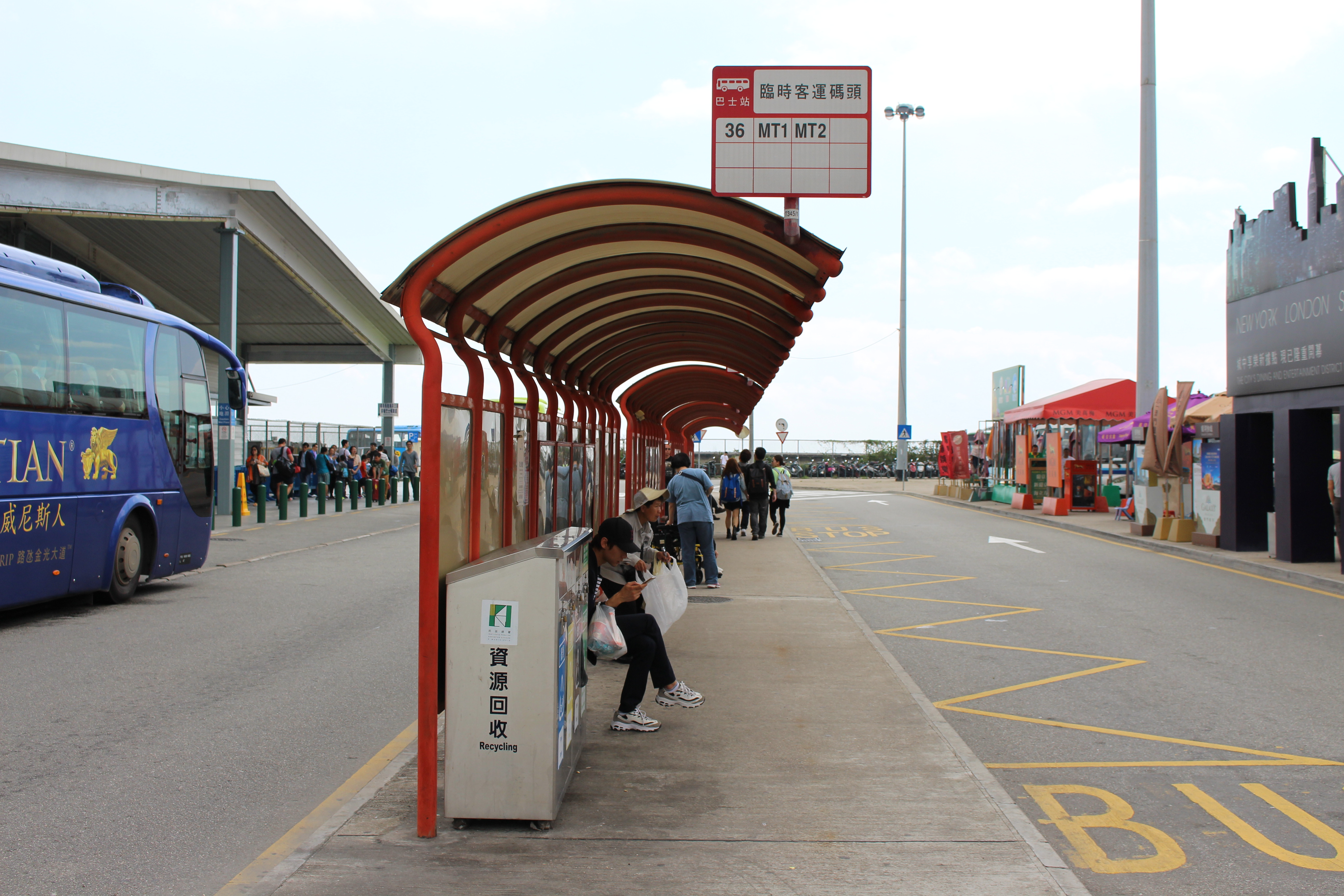 2015年4月的臨時客運碼頭站.